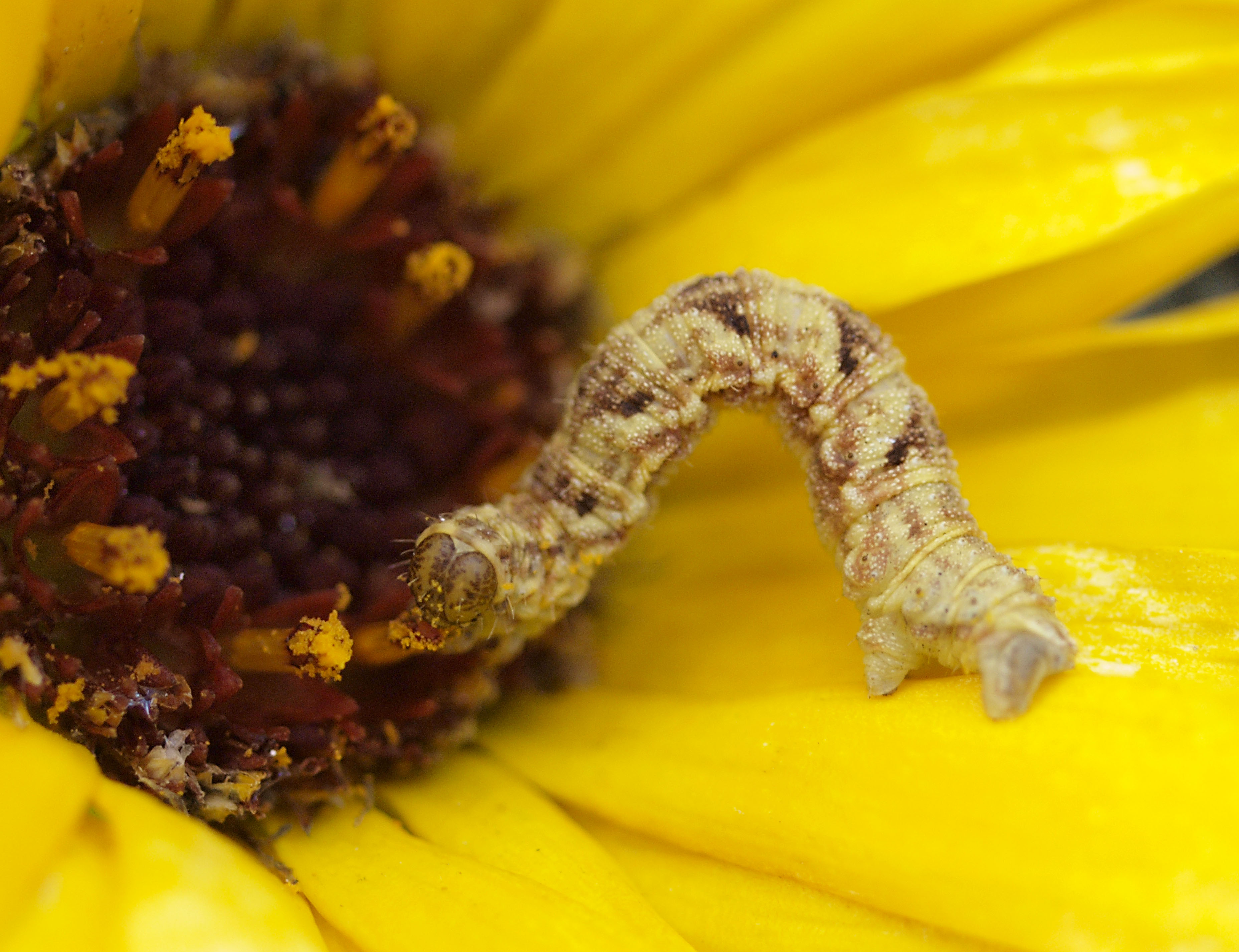 Brun Dværgmåler larve.